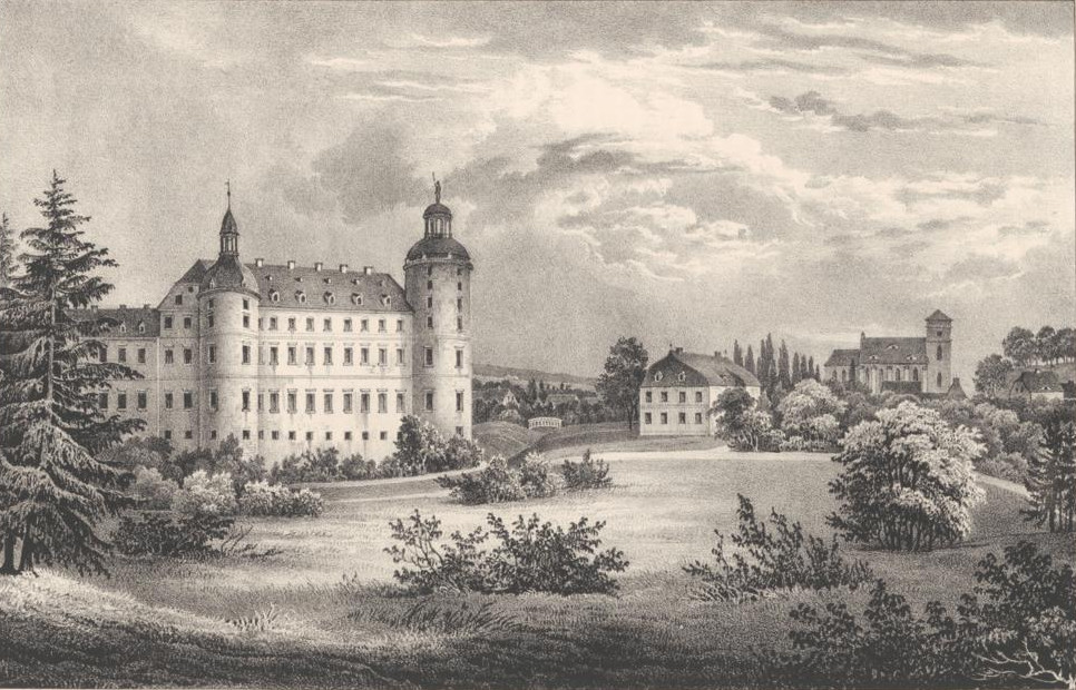 Schloss Muskau, Lithographie : 20 x 12 cm, Heinrich Wilhelm Teichgräber